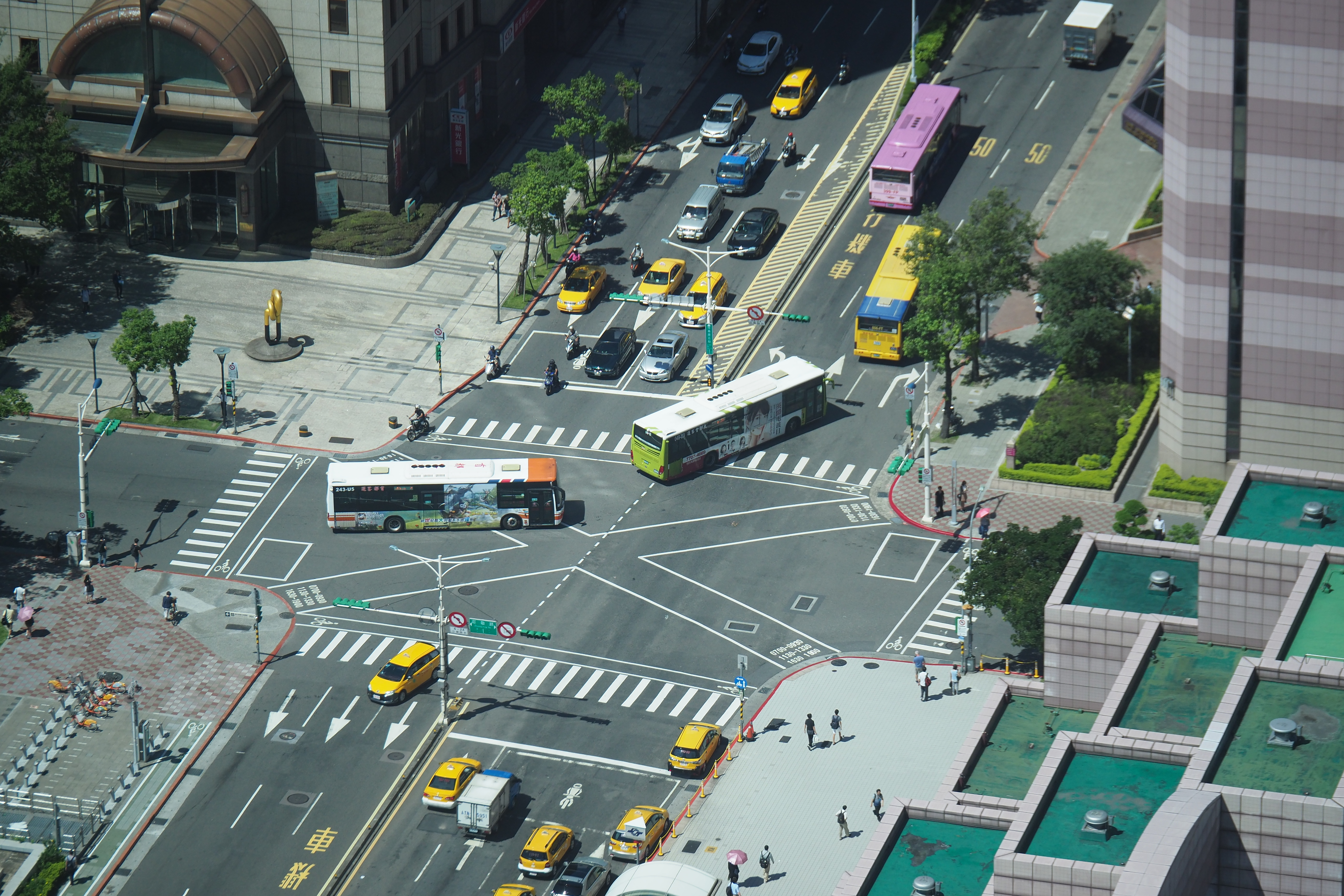 臺北市信義區莊敬路與信義路五段口。